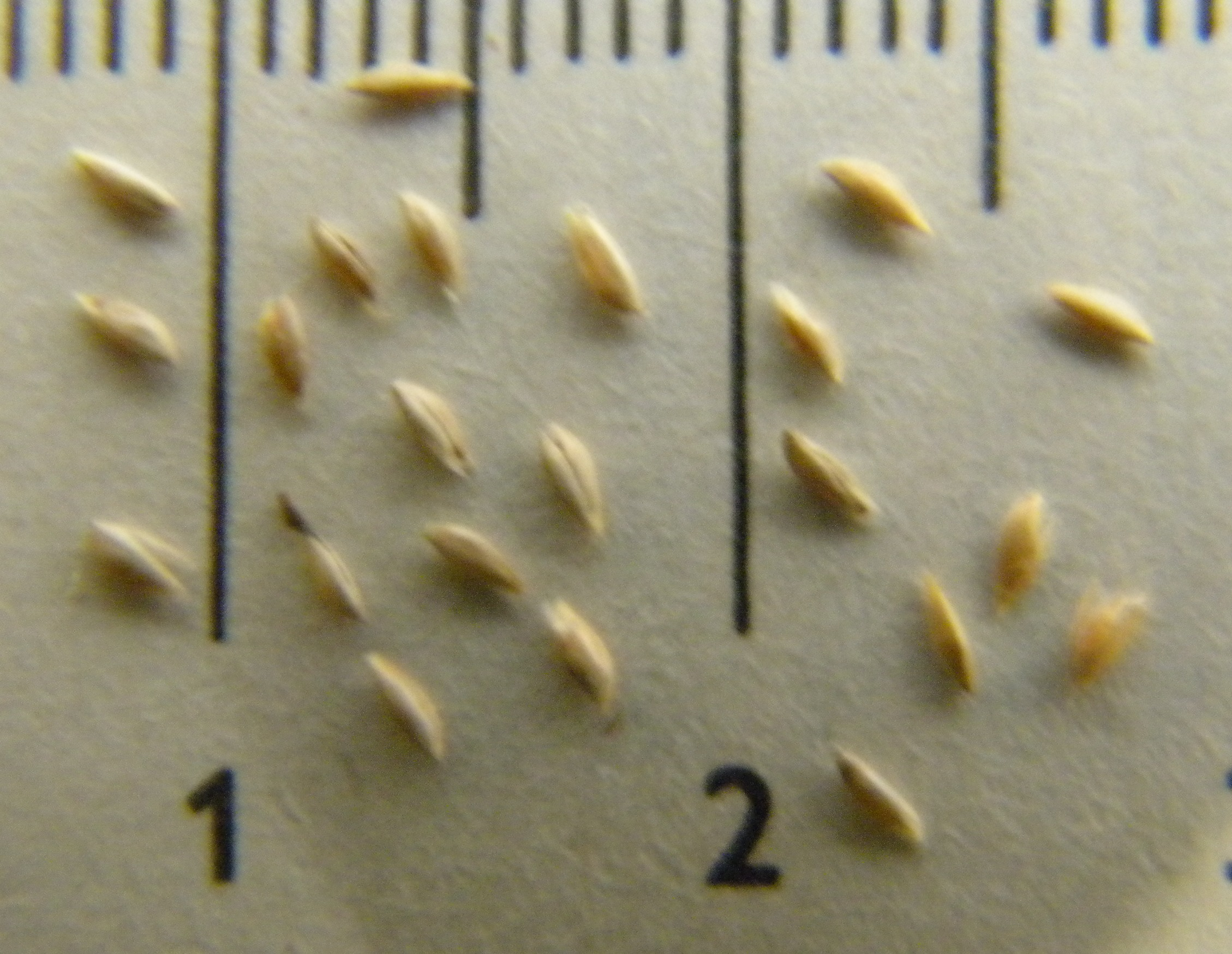 Holcus lanatus (grajnoj)